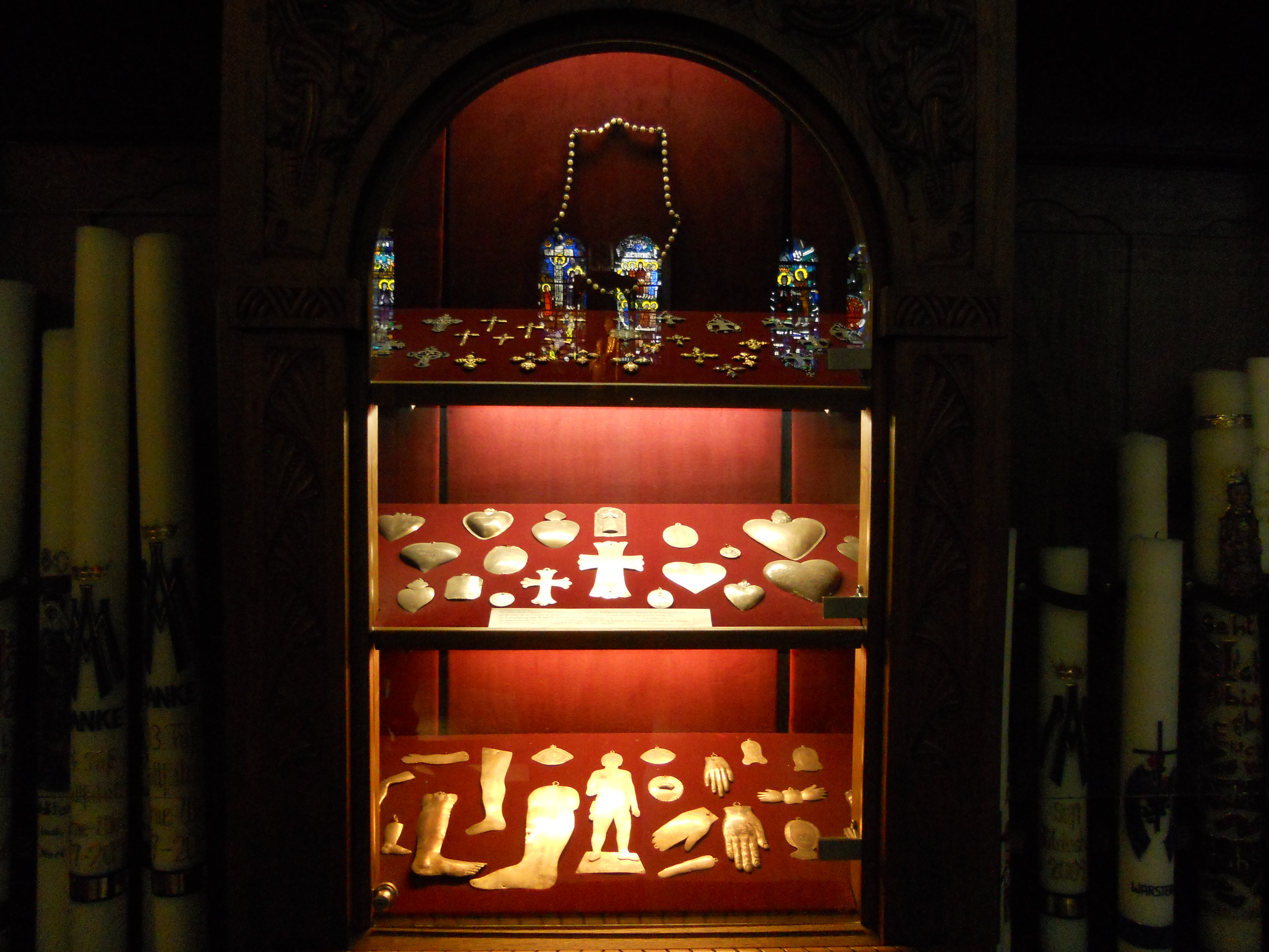 Vitrine mit Votivgaben in der Wallfahrtsbasilika in Werl